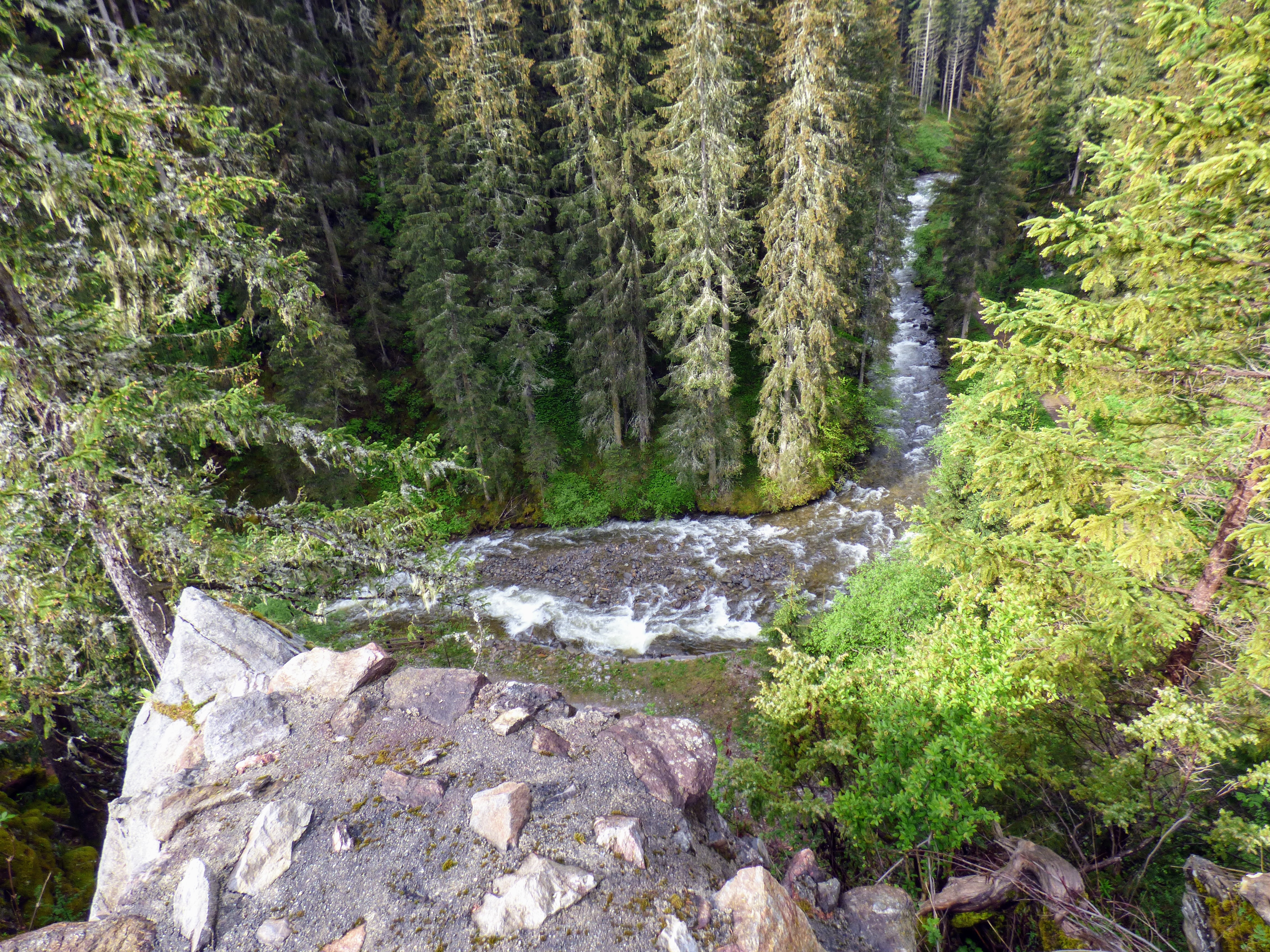 Ruine Edenvest, Gemeinde Thomatal (Salzburg)